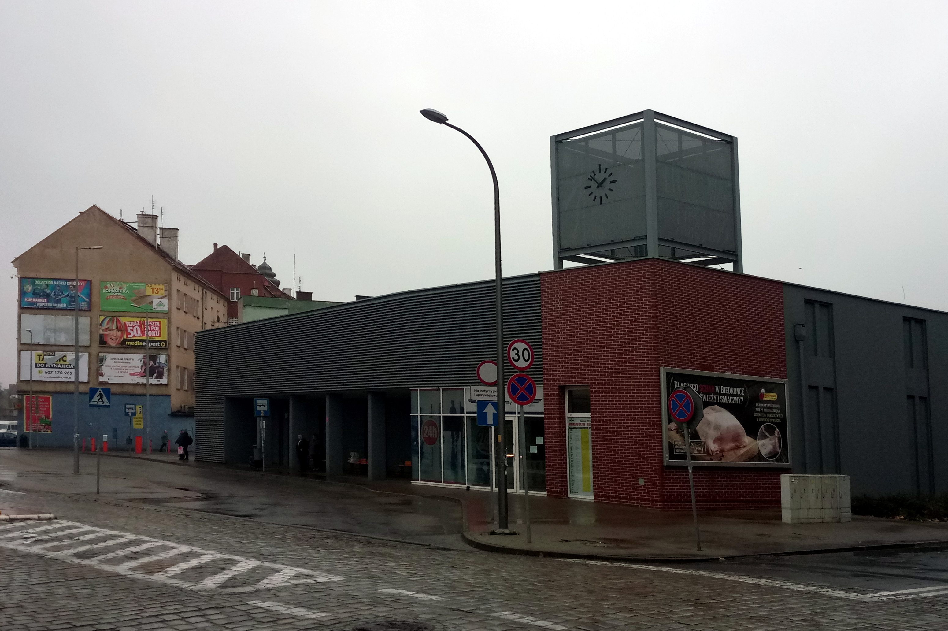 Autobusowy przystanek dworcowy w miejscu dawnego dworca PKS w Legnicy, wykorzystywany przez przewoźników dawnej Państwowej Komunikacji Samochodowej oraz przewoźników marki Flixbus.